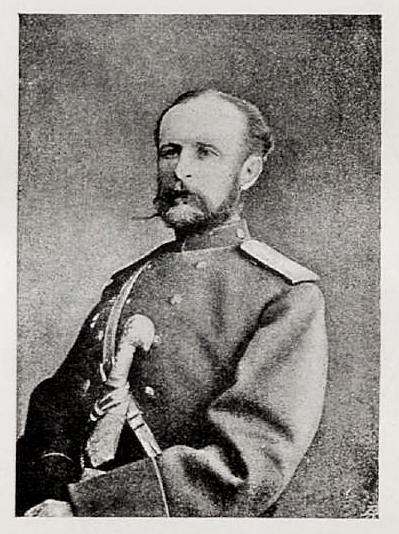 Данное изображение было использовано в статье «Альберт, принц Саксен-Альтенбургский» опубликованной во втором томе «Военной энциклопедии», который был издан книгоиздательским товариществом Ивана Дмитриевича Сытина в 1911 году в столице Российской империи городе Санкт-Петербурге.